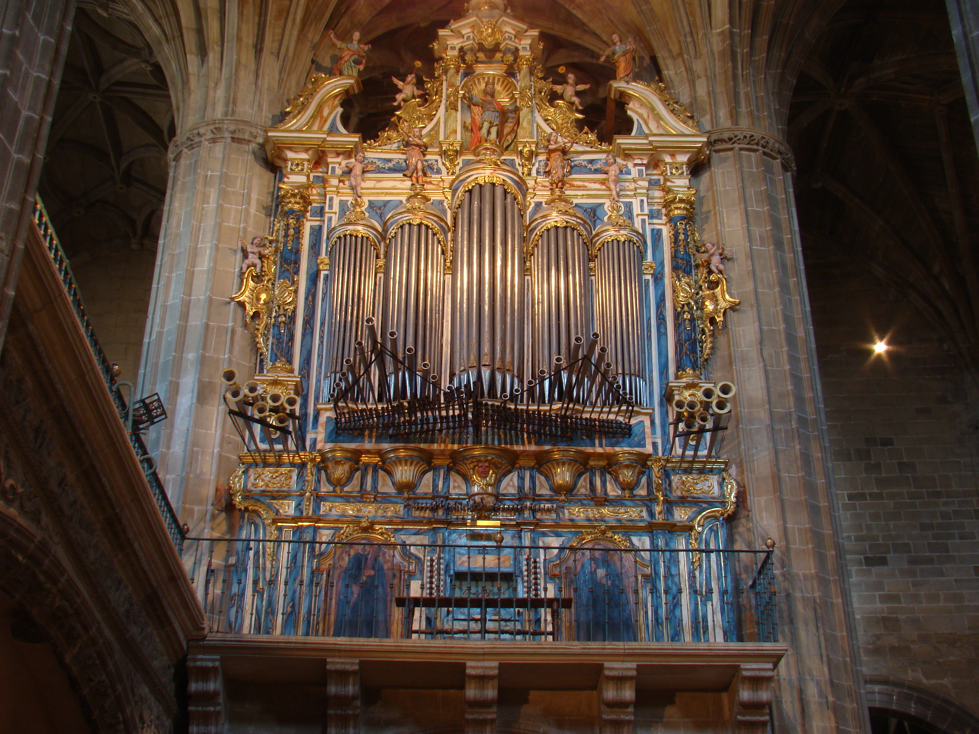 Iglesia de Nuestra Señora de la Asunción en Briones, La Rioja (España). Órgano realizado por Andrés de Gasparini en 1765. Caja rococó de Sebastián de Portu en 1766.